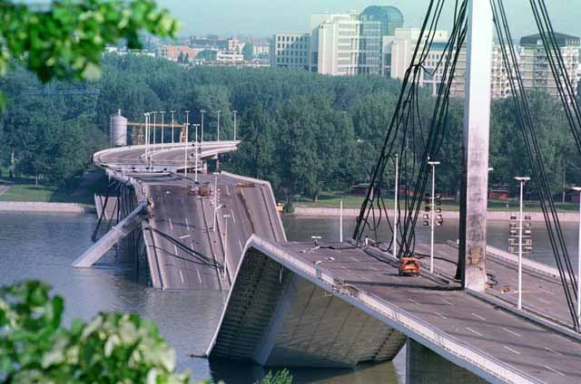 Нато бомбардовање СР Југославија 1999. године. Нато авијација срушила Мост слободе на Дунаву у Новом Саду.